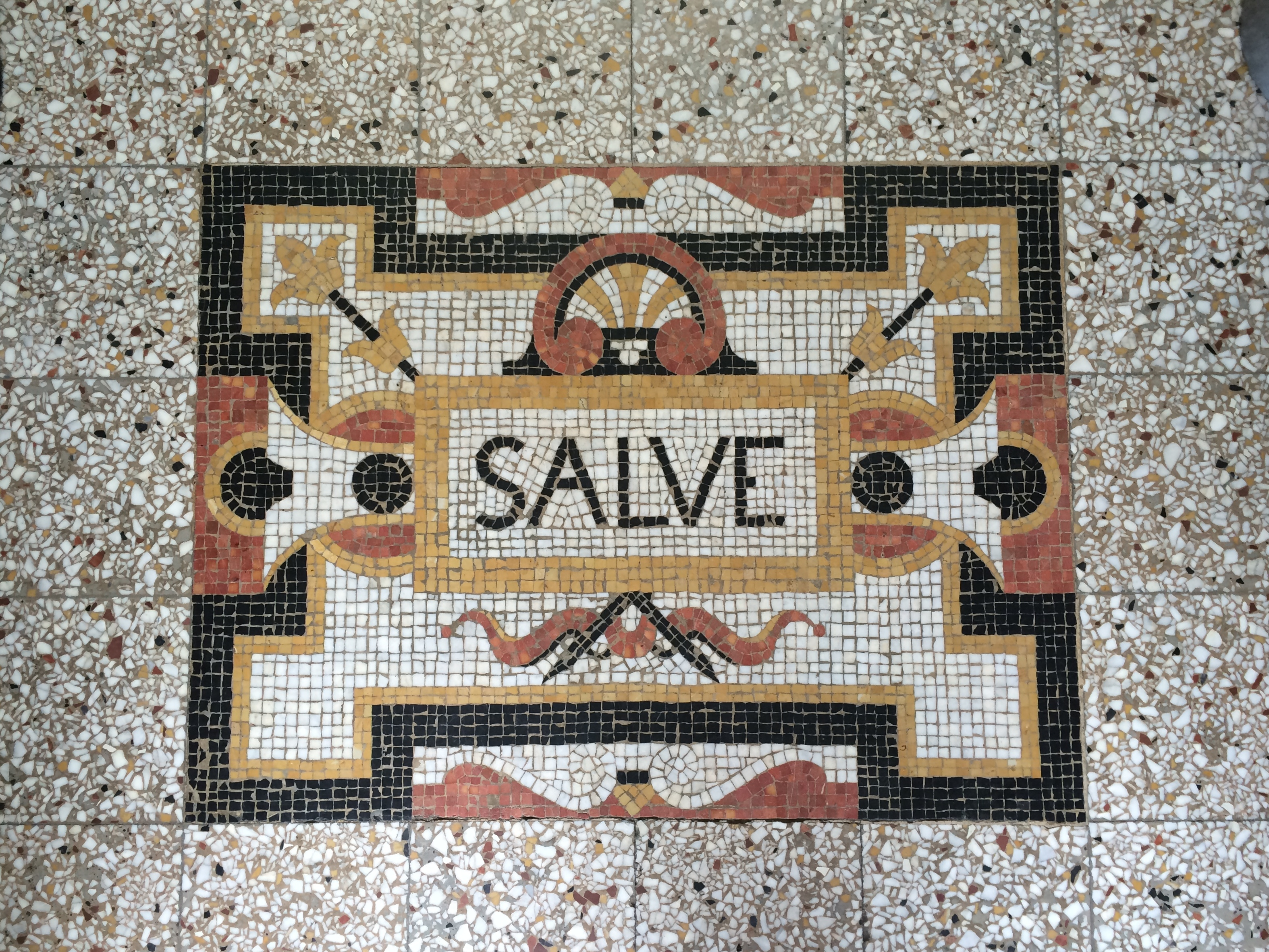 Mosaik beim Eingang zum Museum Rietberg